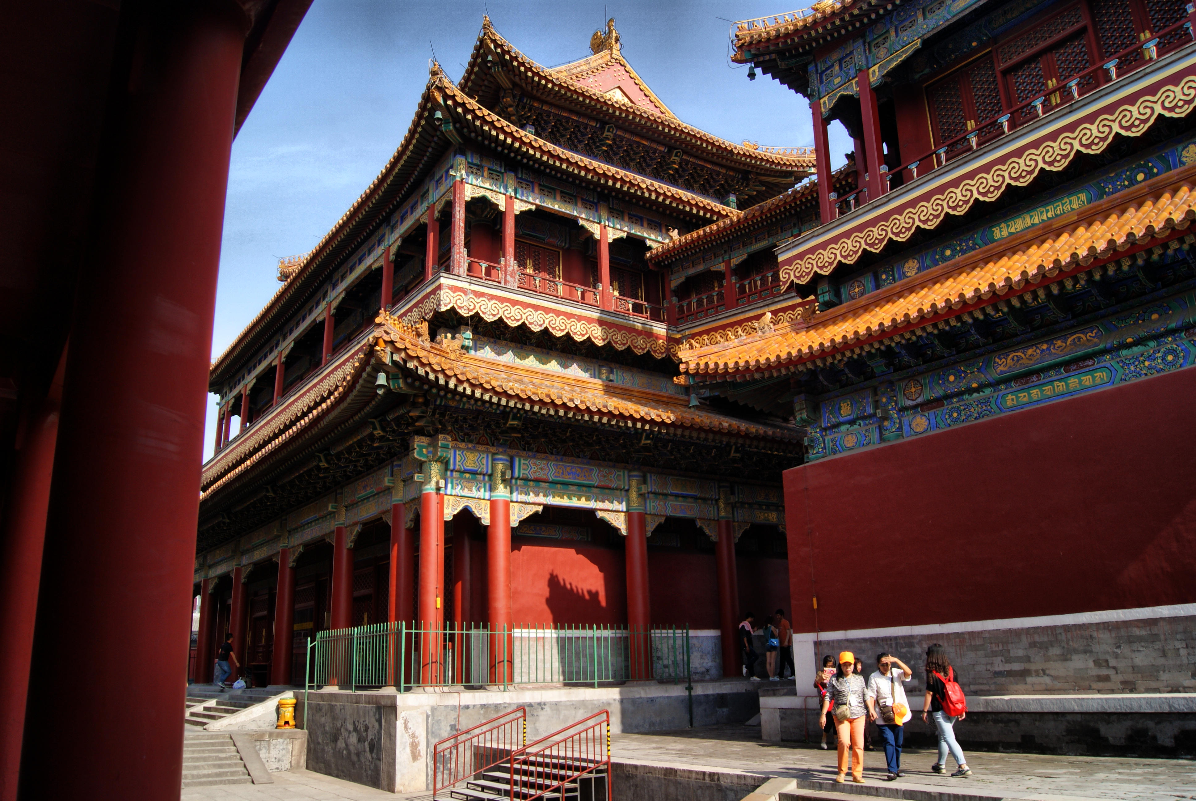 Dongcheng, Beijing, China